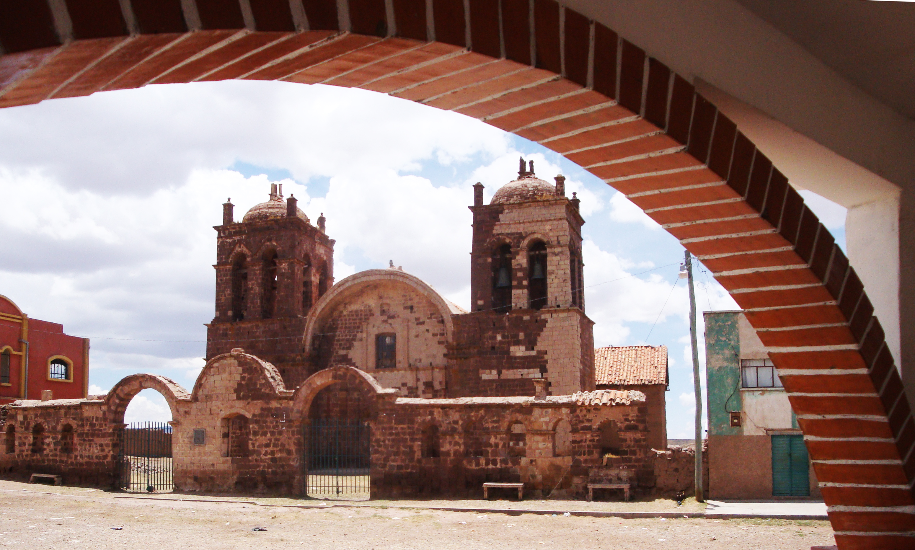 Templo de Caquingora desde la plaza This medium shows the protected monument with the number L/00-310 in Bolivia.